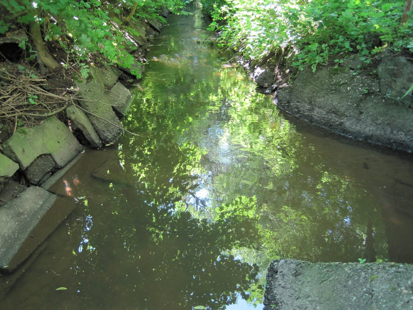 Zusammenfluss von Flehbach (vorne), Frankenforster Bach (rechts) und Fortführung als Faulbach (hinten).